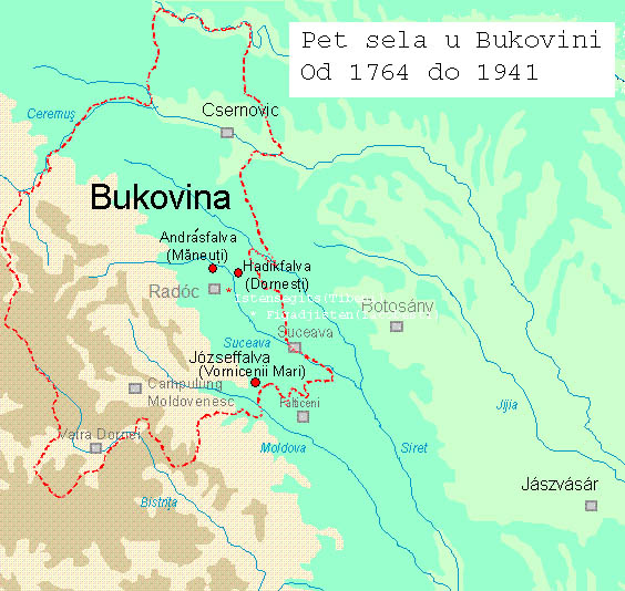 Laslo Varga